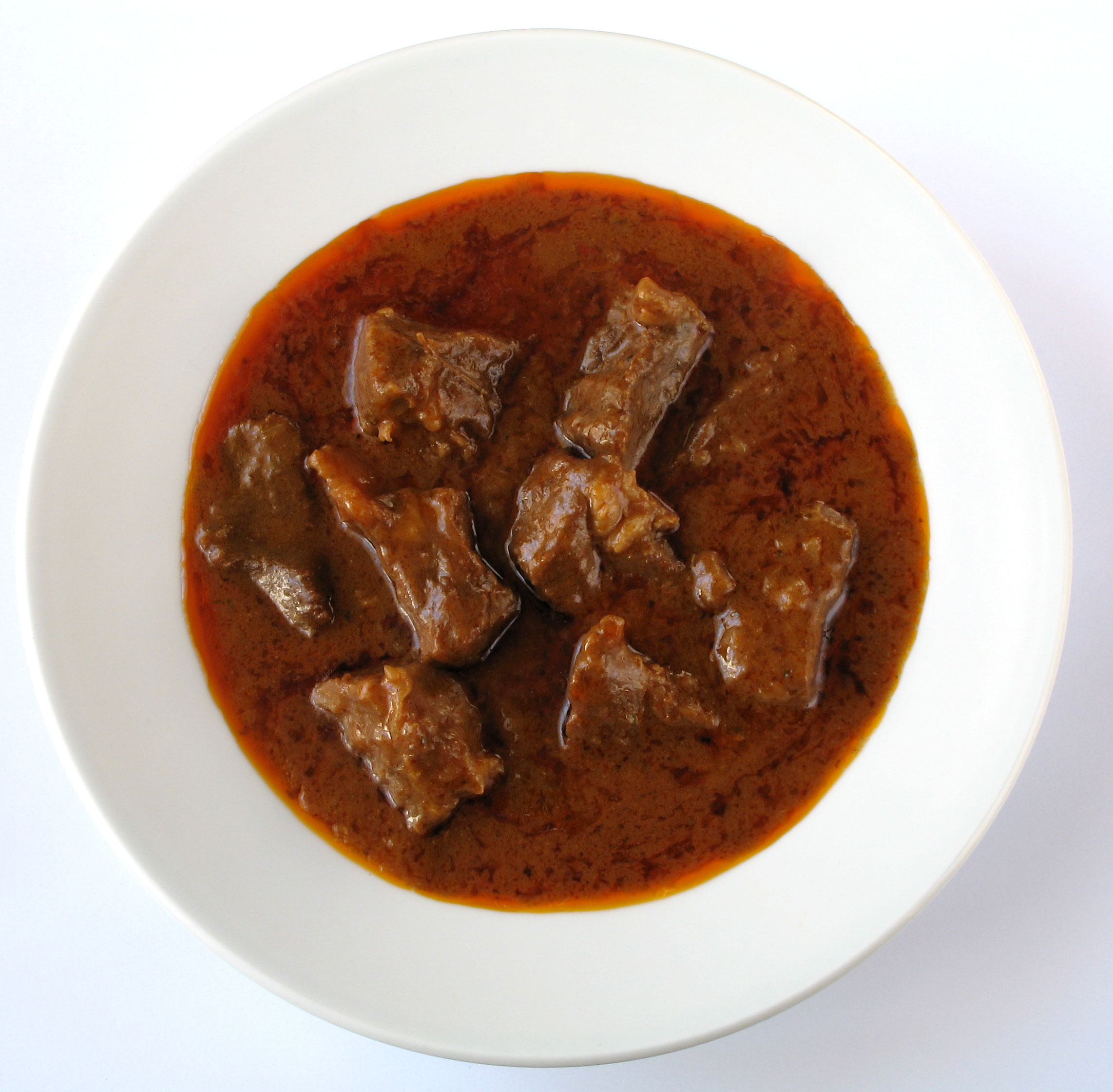 Gulasch (actually: pörkölt) (Ungarische Spezialität)